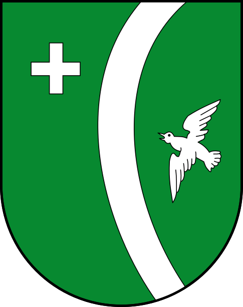 Wappen von Agarn, Kanton Wallis